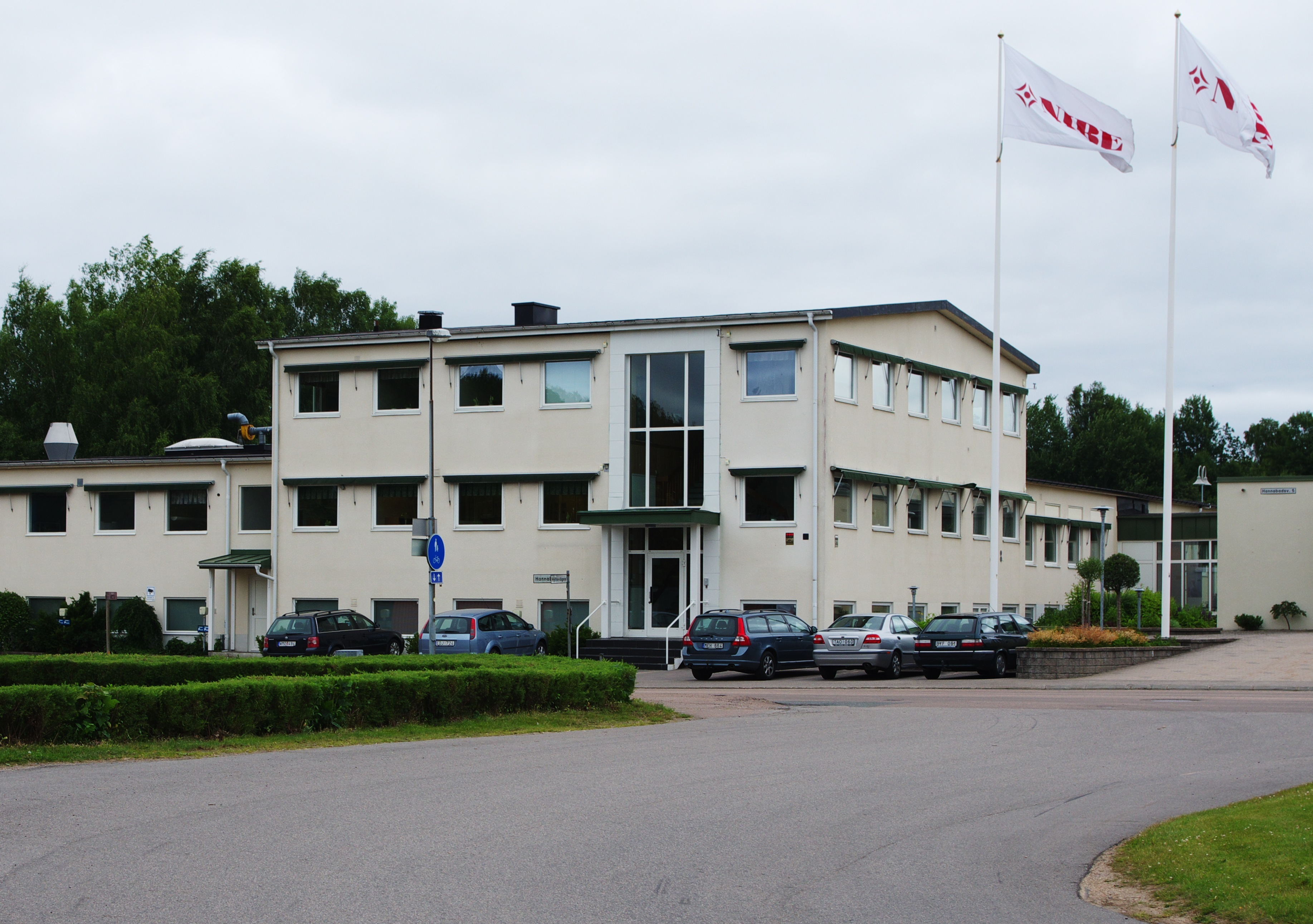 Värmepumpstillverkaren NIBE Energy Systems i Markaryd.